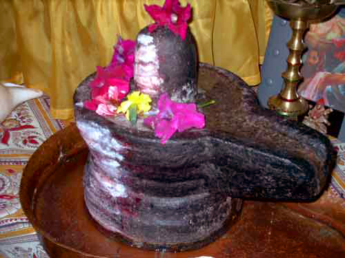 Shiva Lingam im Hindu-Tempel/AAI Wien